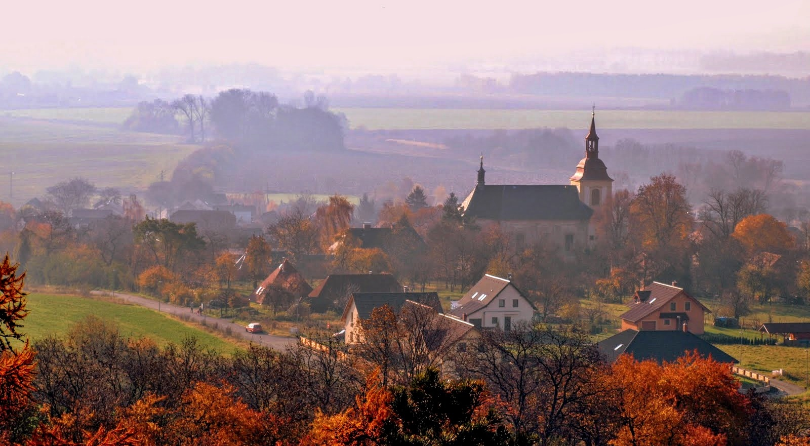 Podzimní Boseň od Valečova